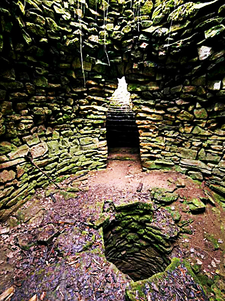 Входът на съоръжението